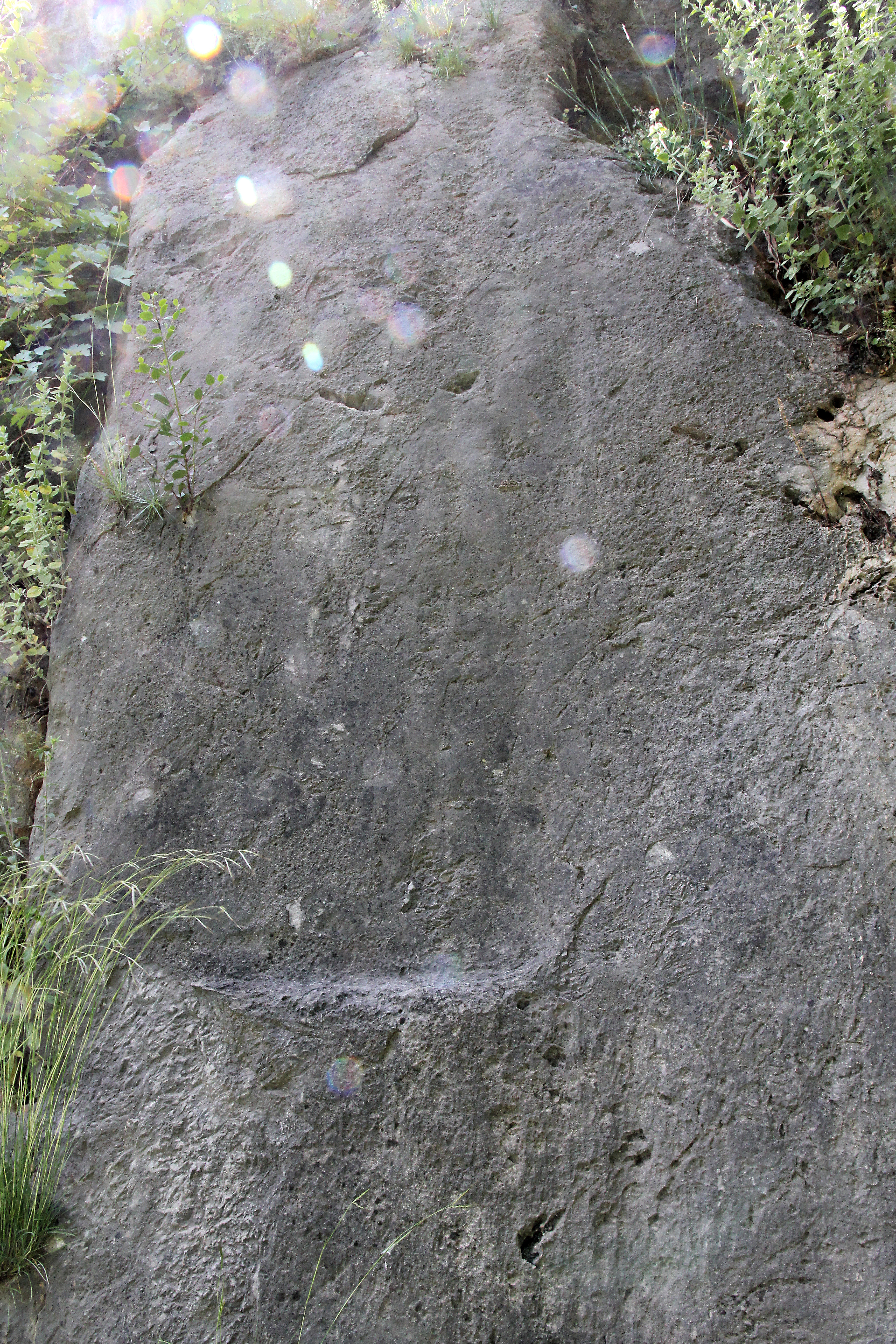 Sirkeli Höyük, archäologische Grabungsstelle mit hethitischem Relief in der Südtürkei, Spuren eines entfernten Reliefs